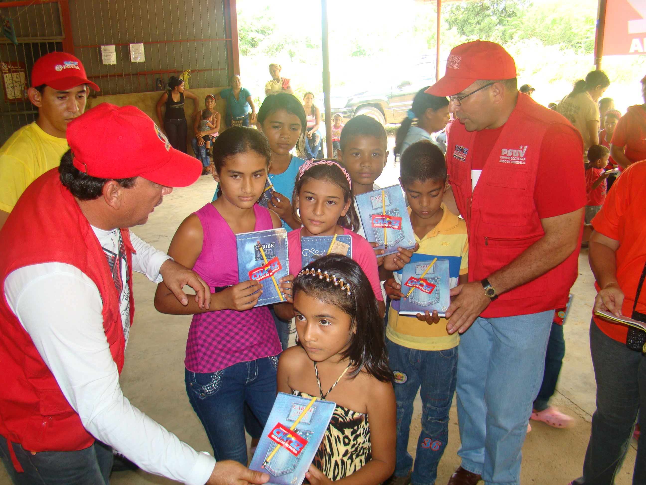 gestion social porfirio oropeza